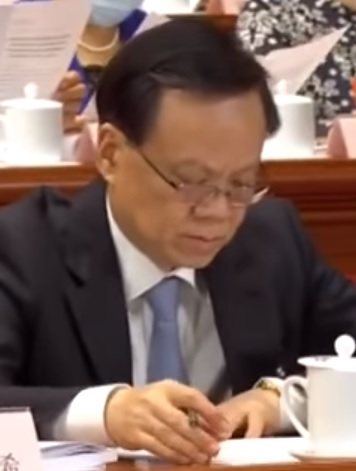 中央政治局委员陈敏尔在十三届全国人大三次会议上，2020年5月22日。